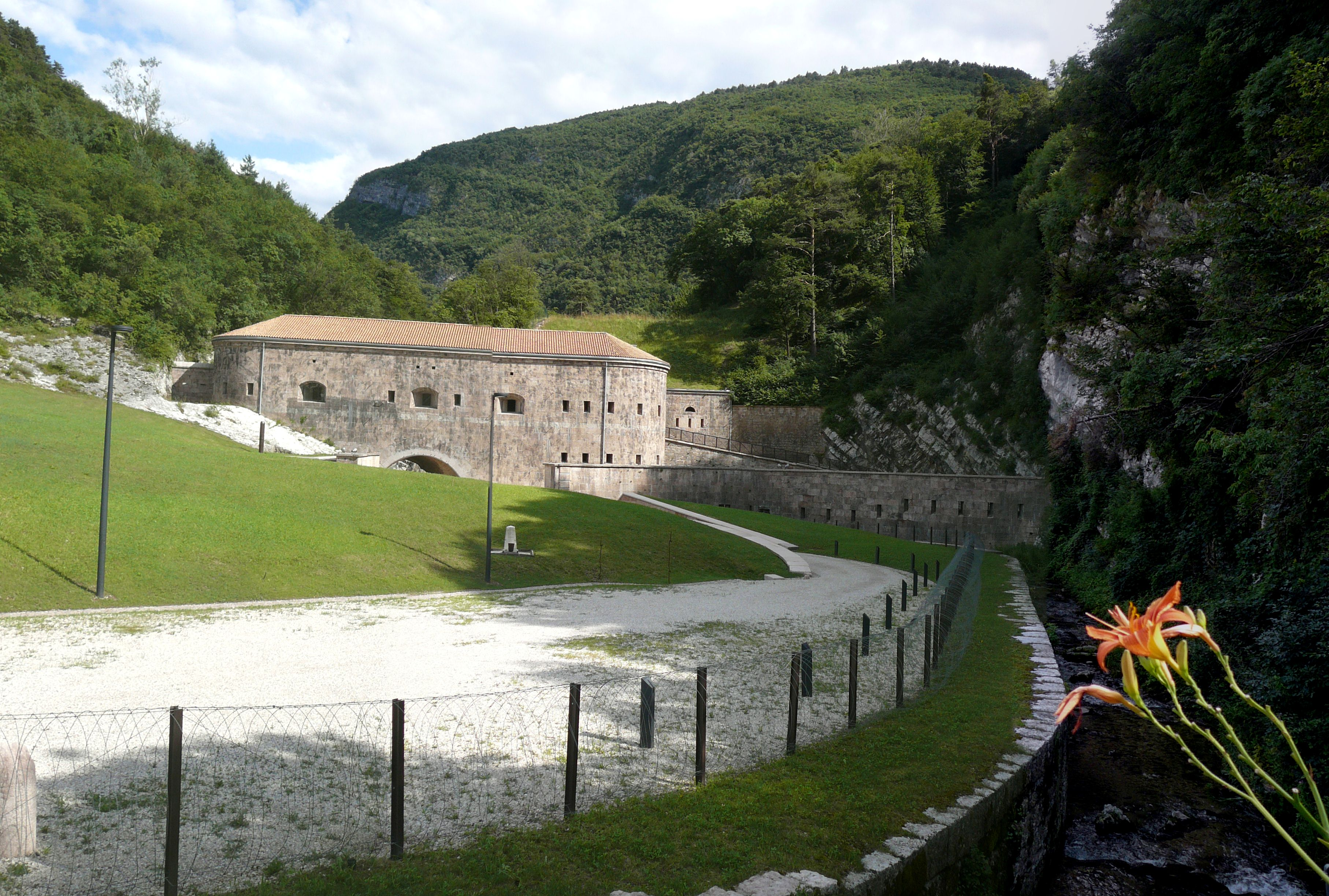 Forte Bus de Vela presso Cadine